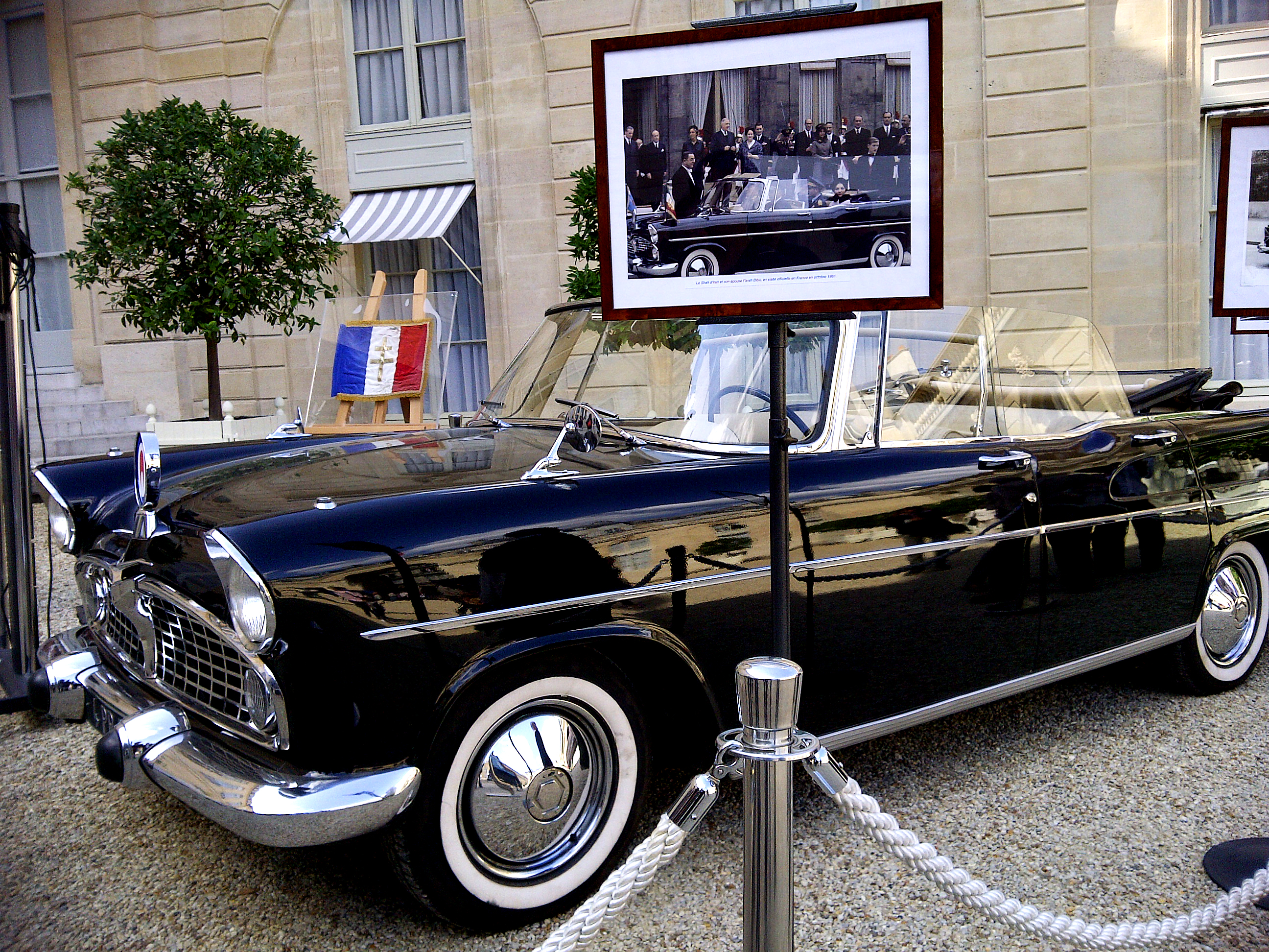 Palais de l'Elysée